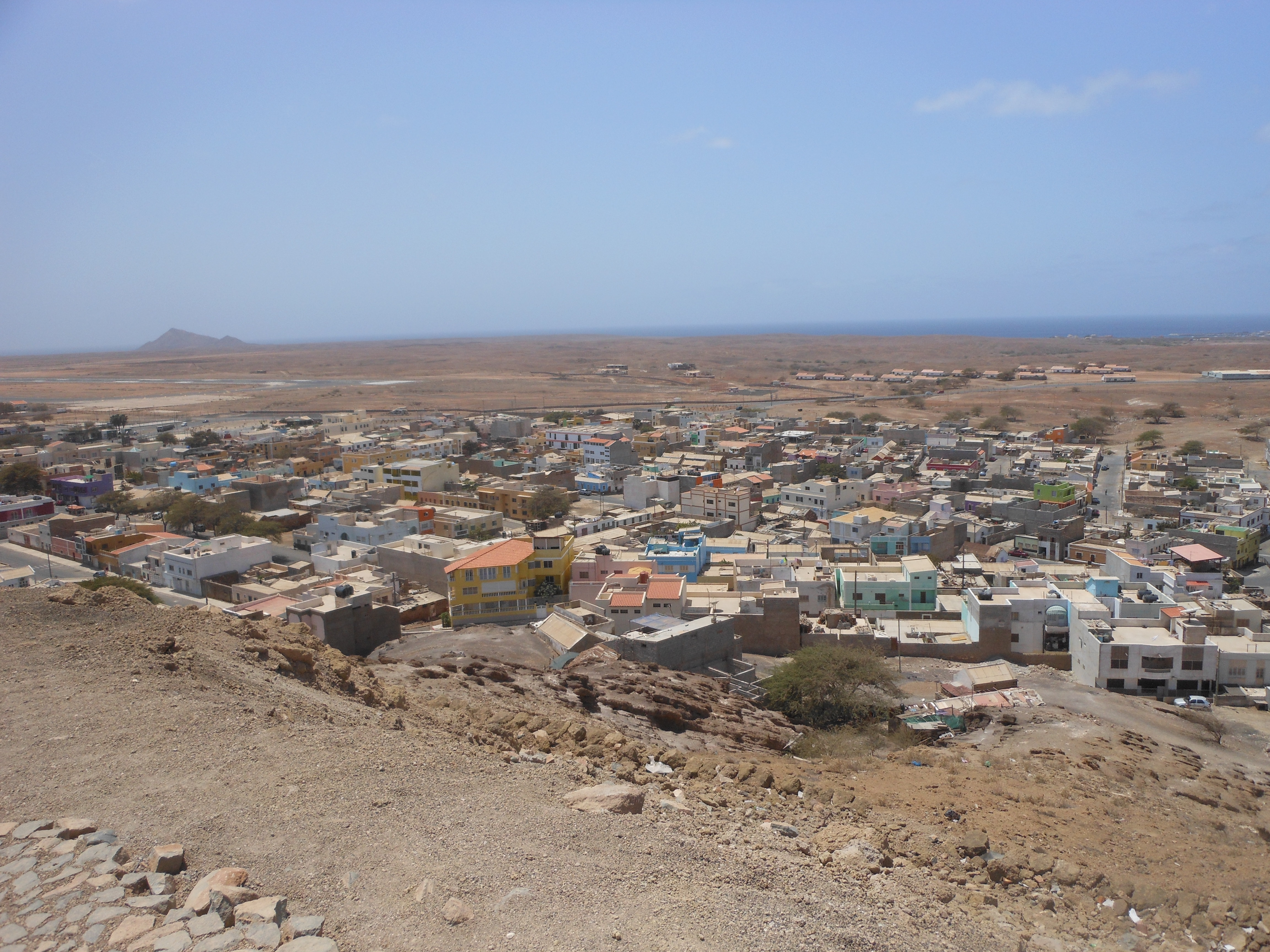 Kapverdy, ostrov Sal, pohľad na mesto Espargos. Unknown